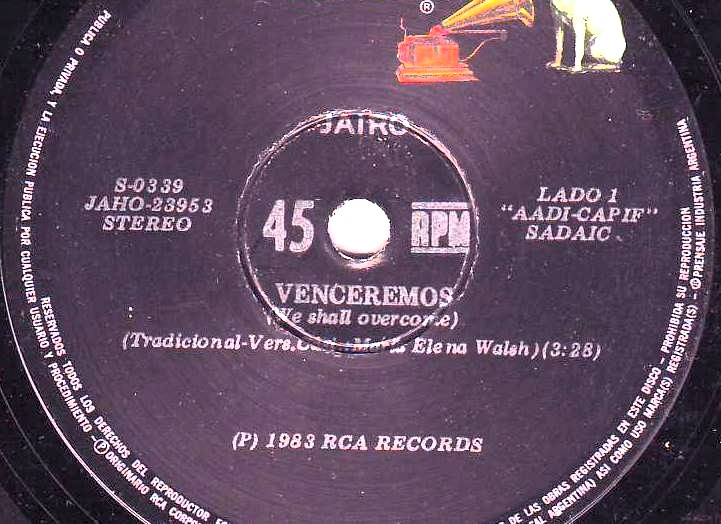 Disco de vinilo simple de Jairo de 1983